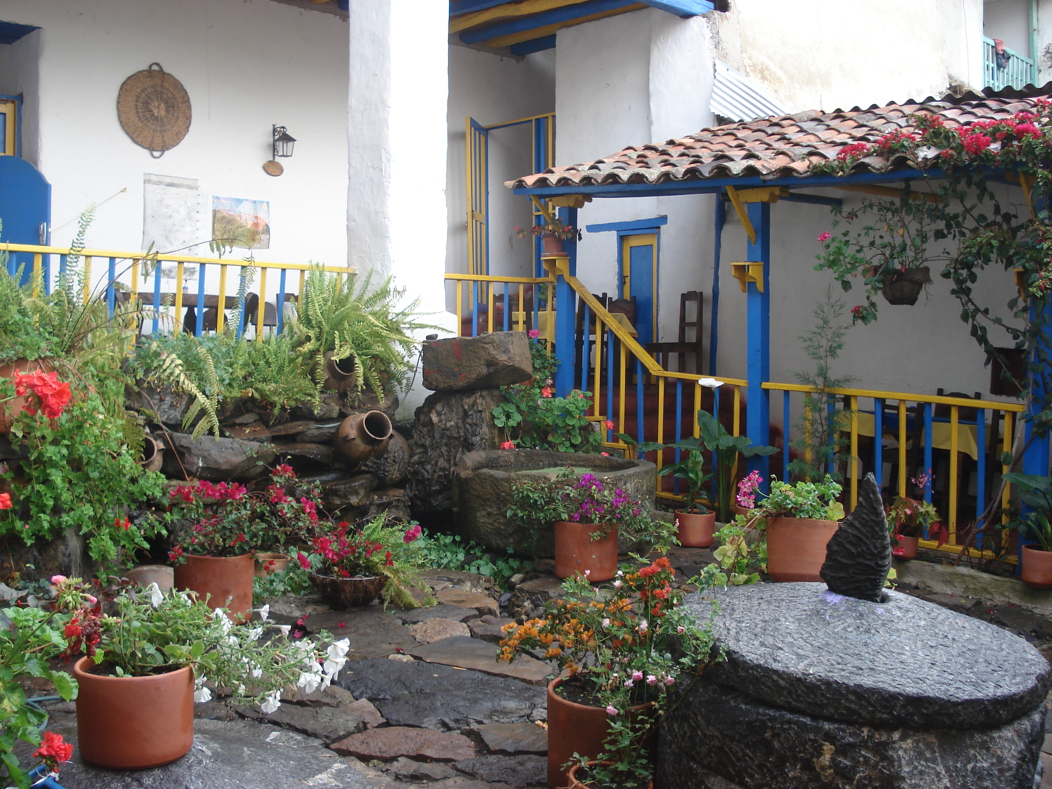 Patio principal en casa colonial del Cocuy